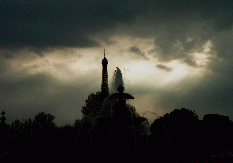 Pilvede varjud õhus.